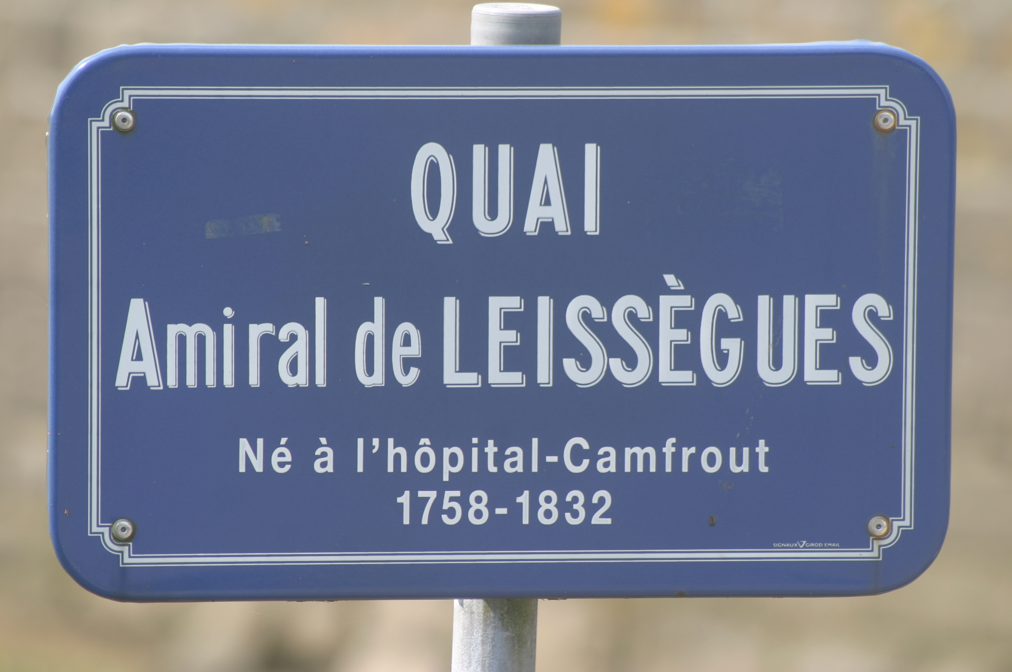 Quai portant le nom de l'amiral Corentin Urbain de Leissègues